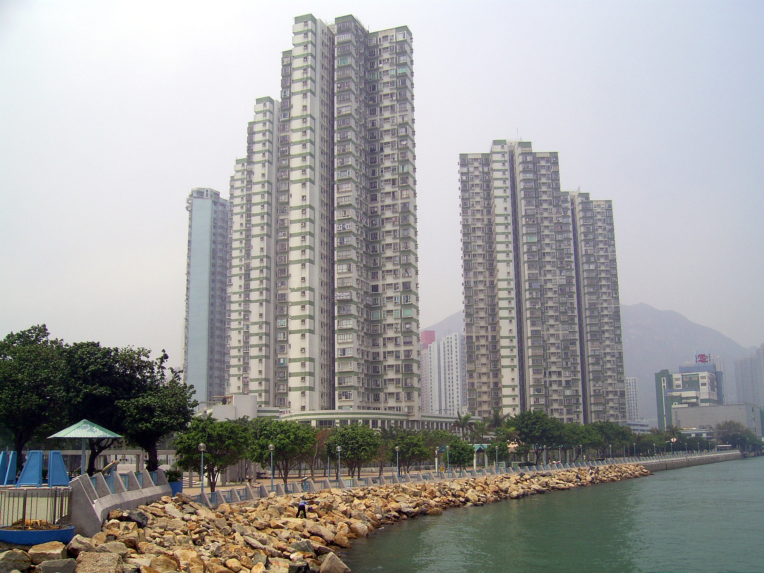 中文（香港）: 慧豐園